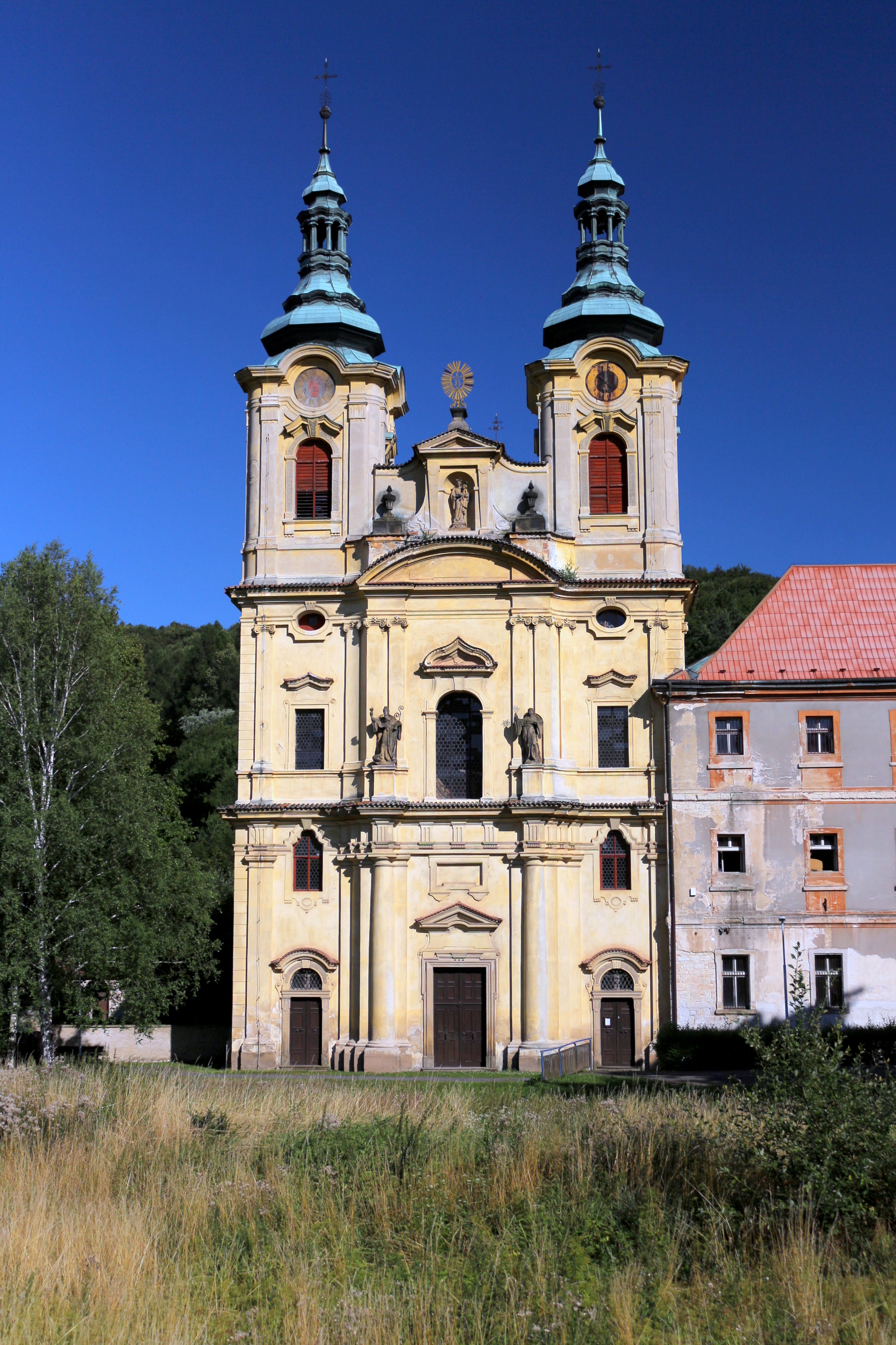 Klášterní kostel Narození Panny Marie v Dolním Ročově